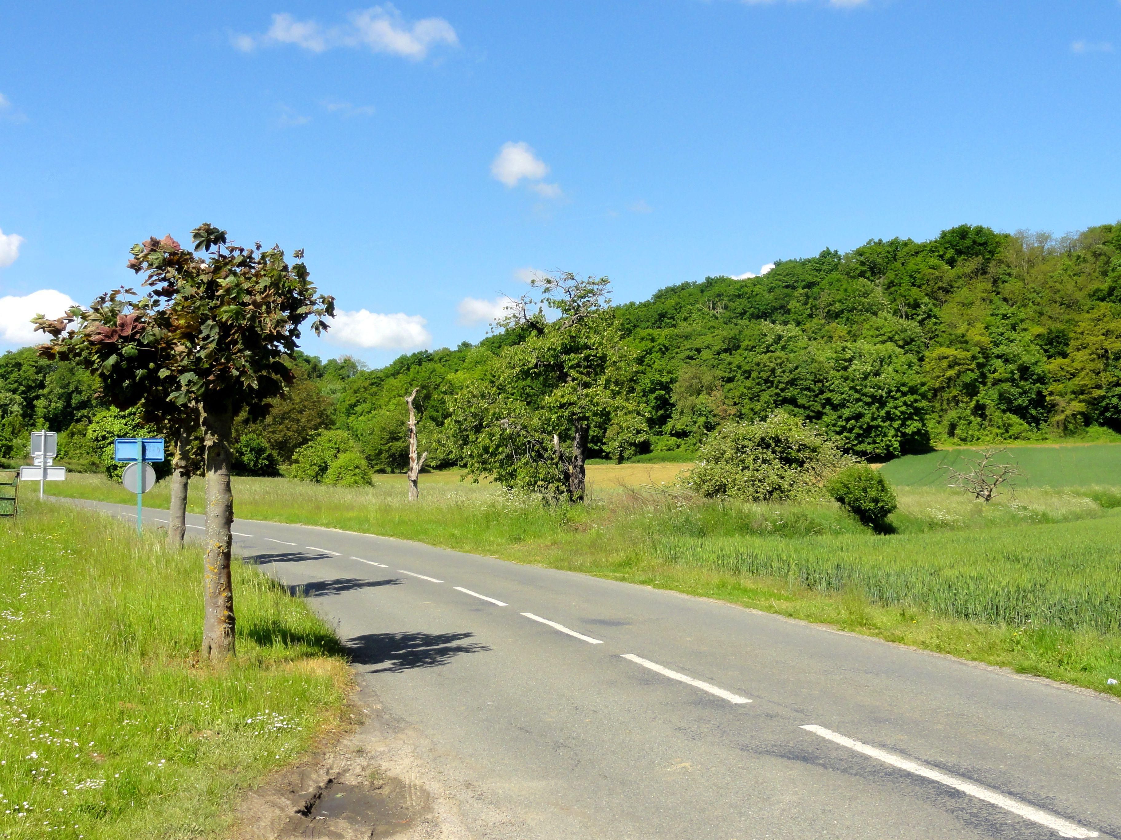 Paysage au sud du village (vue depuis la RD 75 vers Rieux).